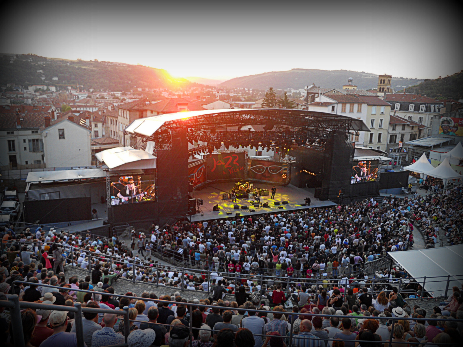 Le soleil se couche derrière la scène du théâtre antique # Festival de jazz de Vienne 2013 # Isère (38) .